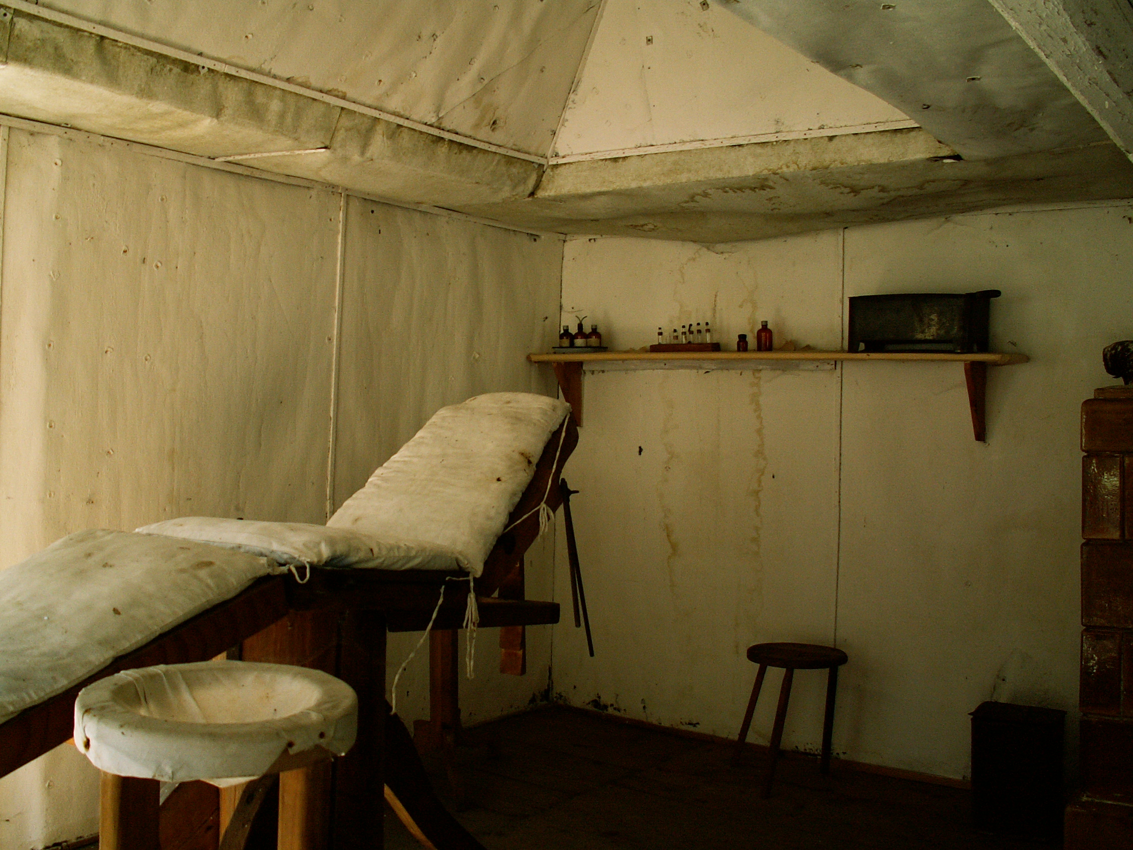 Aseptic operating room in Zgornji Hrastnik partisan hospital in Kočevski Rog, Slovenia